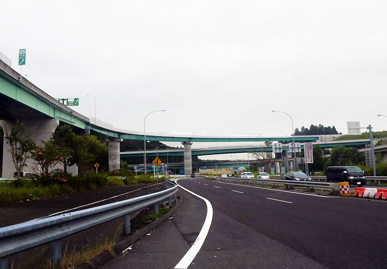 東金ジャンクション（千葉東金側）